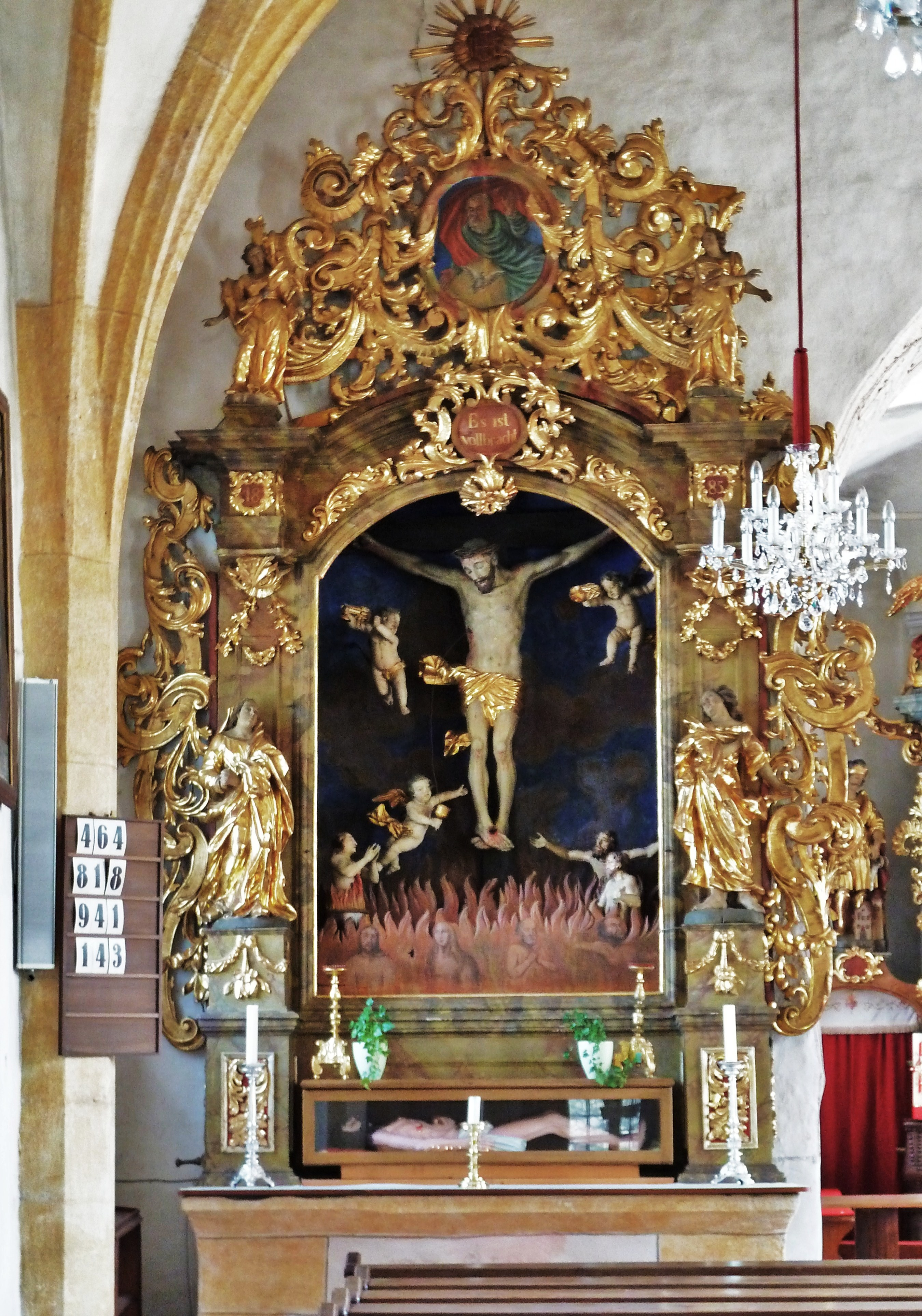 Tiffen. Der linke Seitenaltar der katholischen Pfarrkirche zeigt den gekreuzigten Jesus mit den armen Seelen im Fegefeuer.